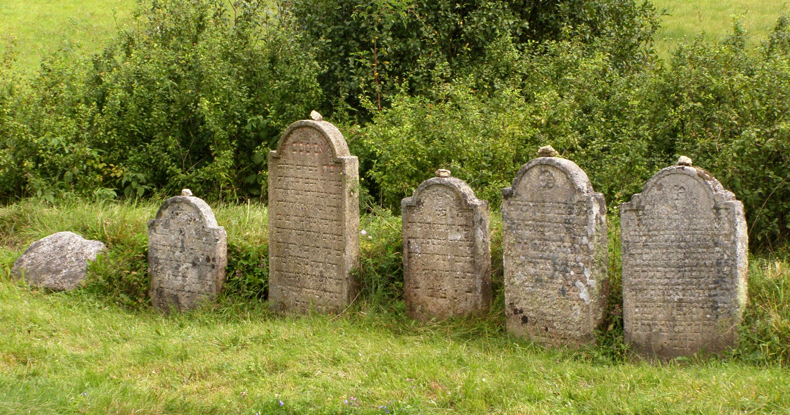 Česky: Staré Město pod Landštejnem, židovský hřbitov